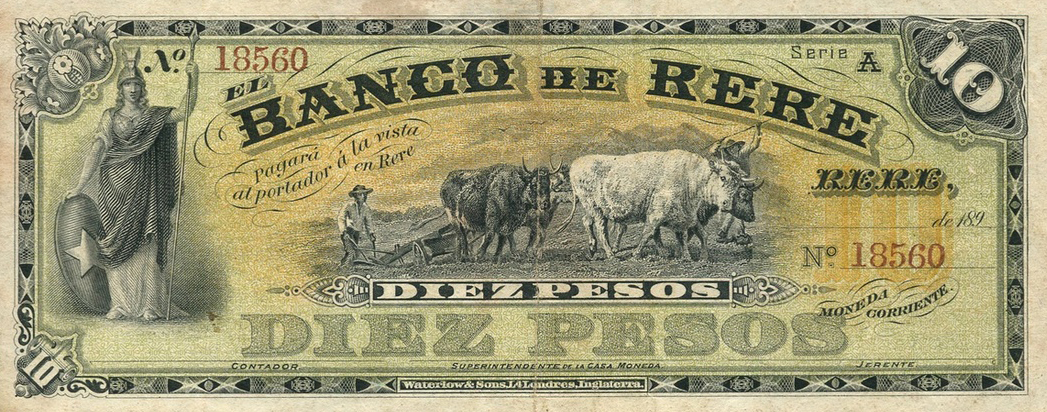 Billete de 10 pesos del Banco de Rere